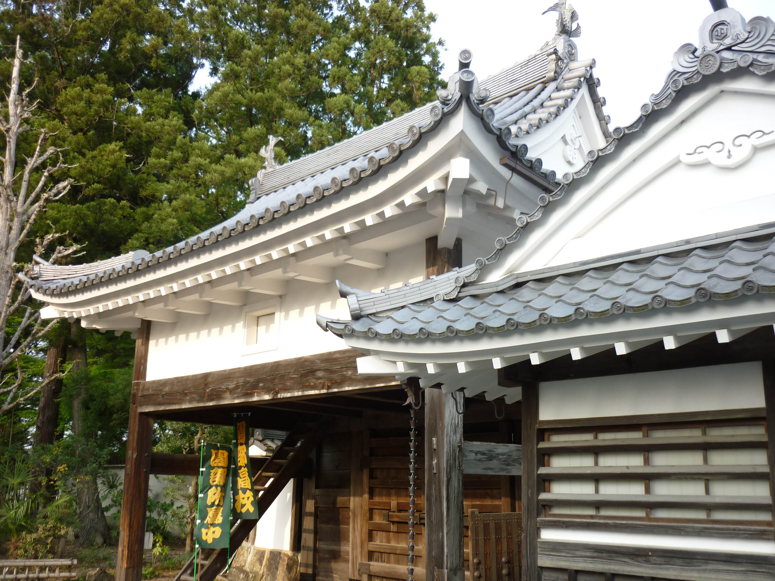 城門